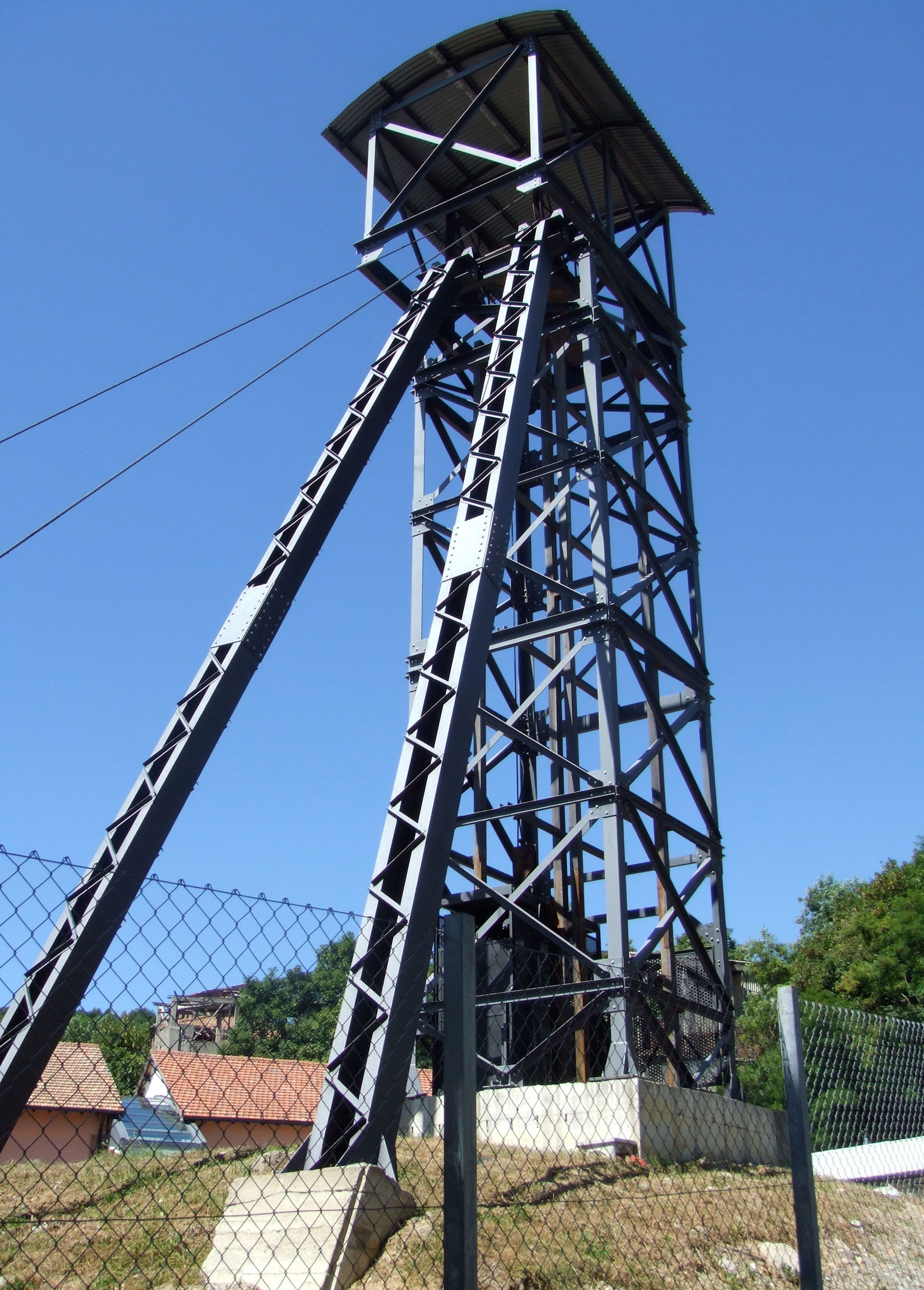 Puits de mine de cinabre à Abbadia San Salvatore